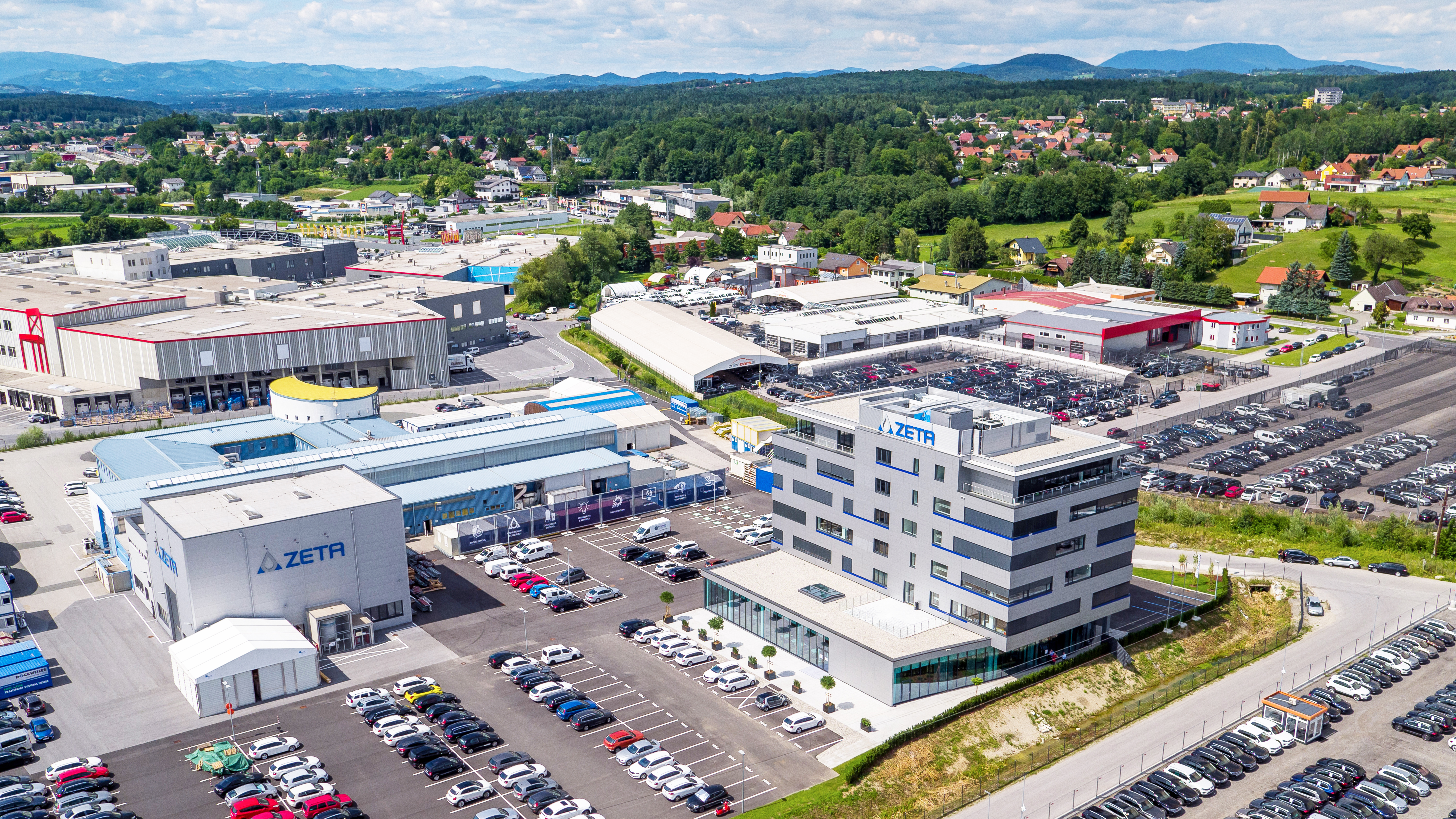 Die ZETA Holding GmbH hat ihren Hauptsitz im steirischen Lieboch. Der Standort wurde zuletzt 2020 um ein neues Technologiezentrum (IZZ) erweitert.